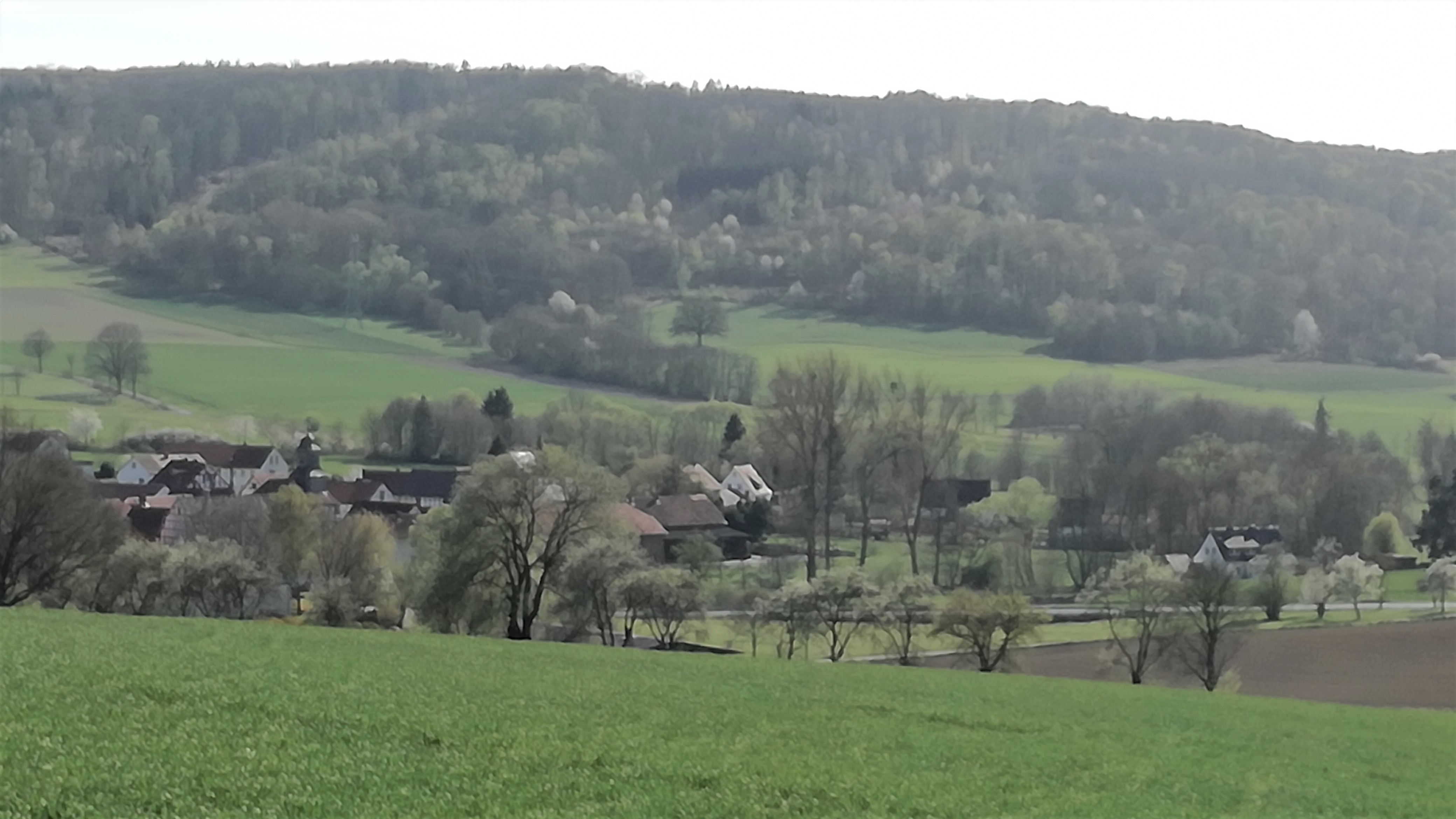 Ansicht von Nordost